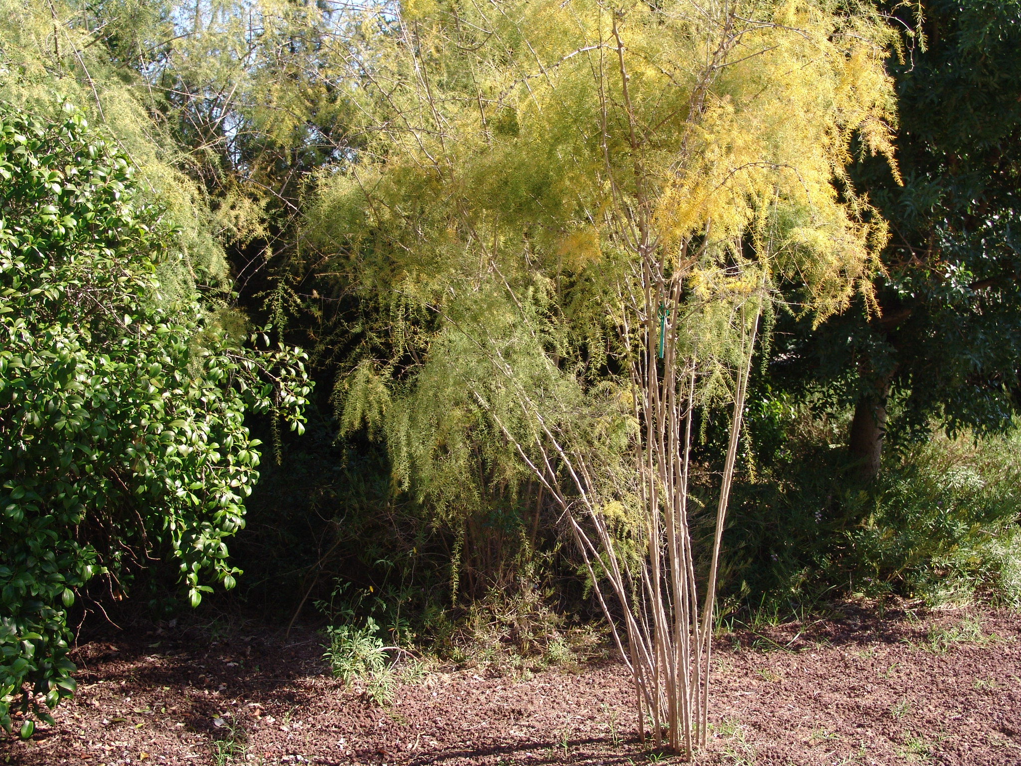 Asparagus scoparius al Jardí Botànic de Barcelona.